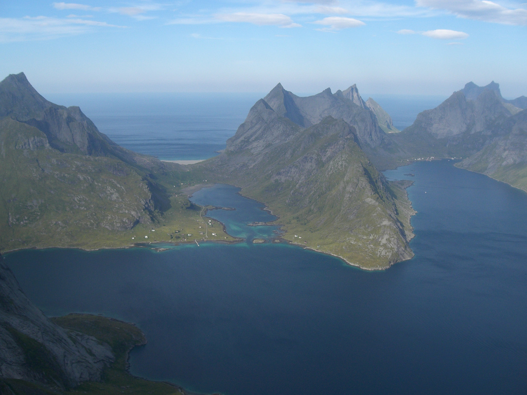 Moskenesøya: Kjerkfjorden til høgre, Bunesfjorden i midten, Forsfjorden går mot venstre. Bygdelaget på neset til venstre for Bunesfjorden heiter Vindnes, medan bygda Kjerkfjorden ligg inst i Kjerkfjorden. Fjelltoppen til venstre er Storskiva (848 moh.). Den høgaste av toppane på høgre side av Bunesfjorden er Stamprevtinden (748 moh.), medan Breiflogtinden er 720 moh. og Moltbærtinden er 700 moh.